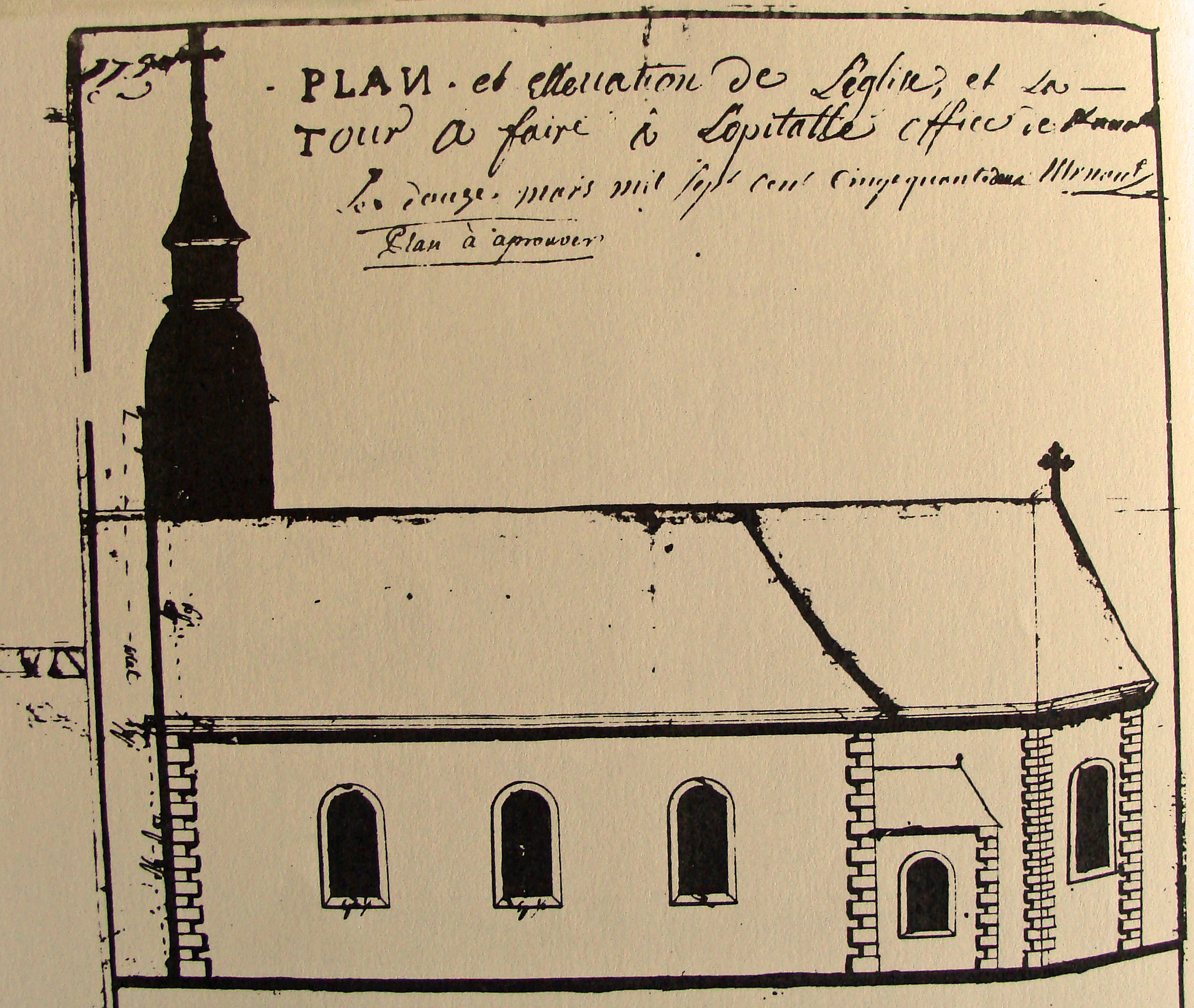 église de L'Hôpital, plan de 1752 (extérieur)